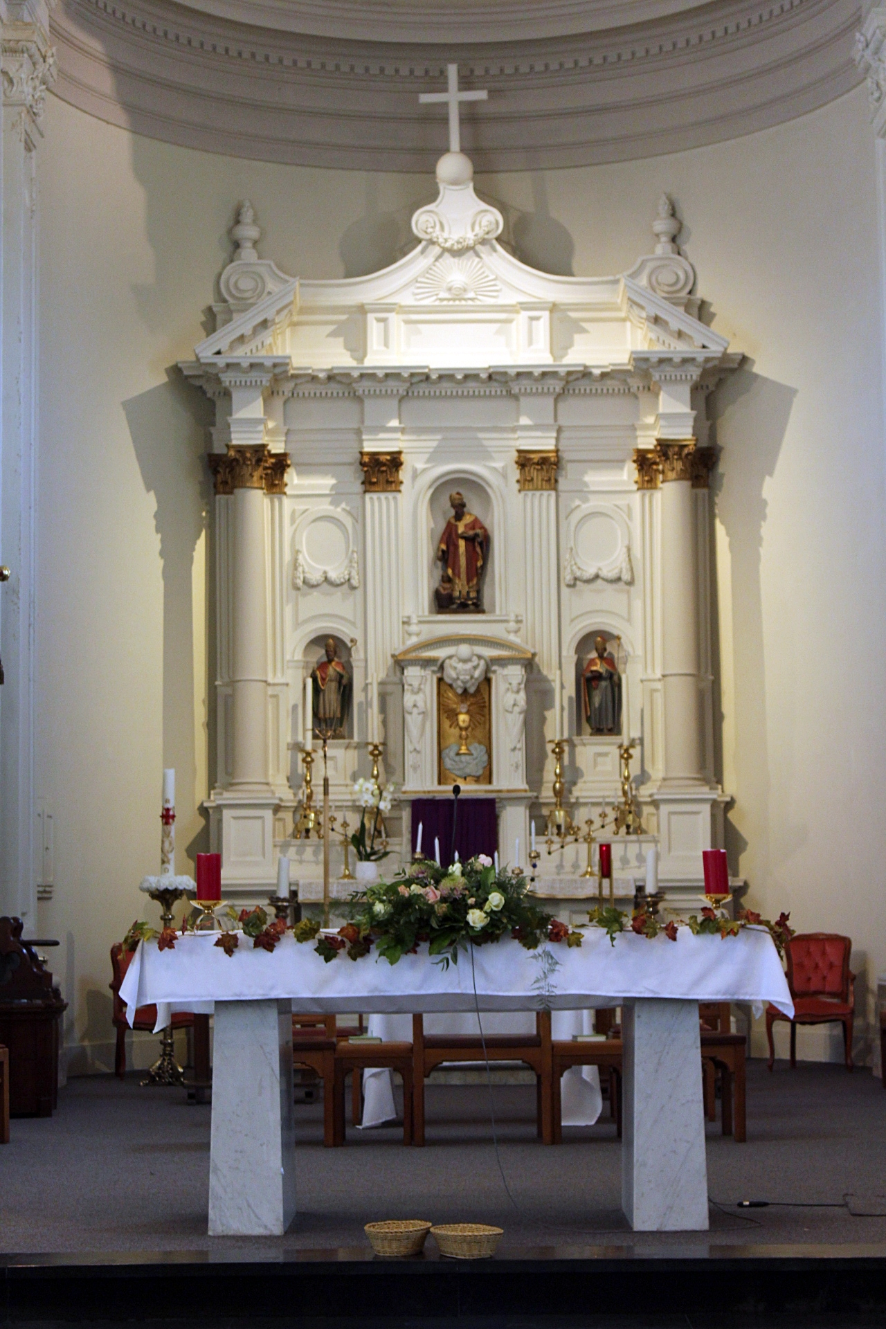 Neorenaissance altaar uit 1872.